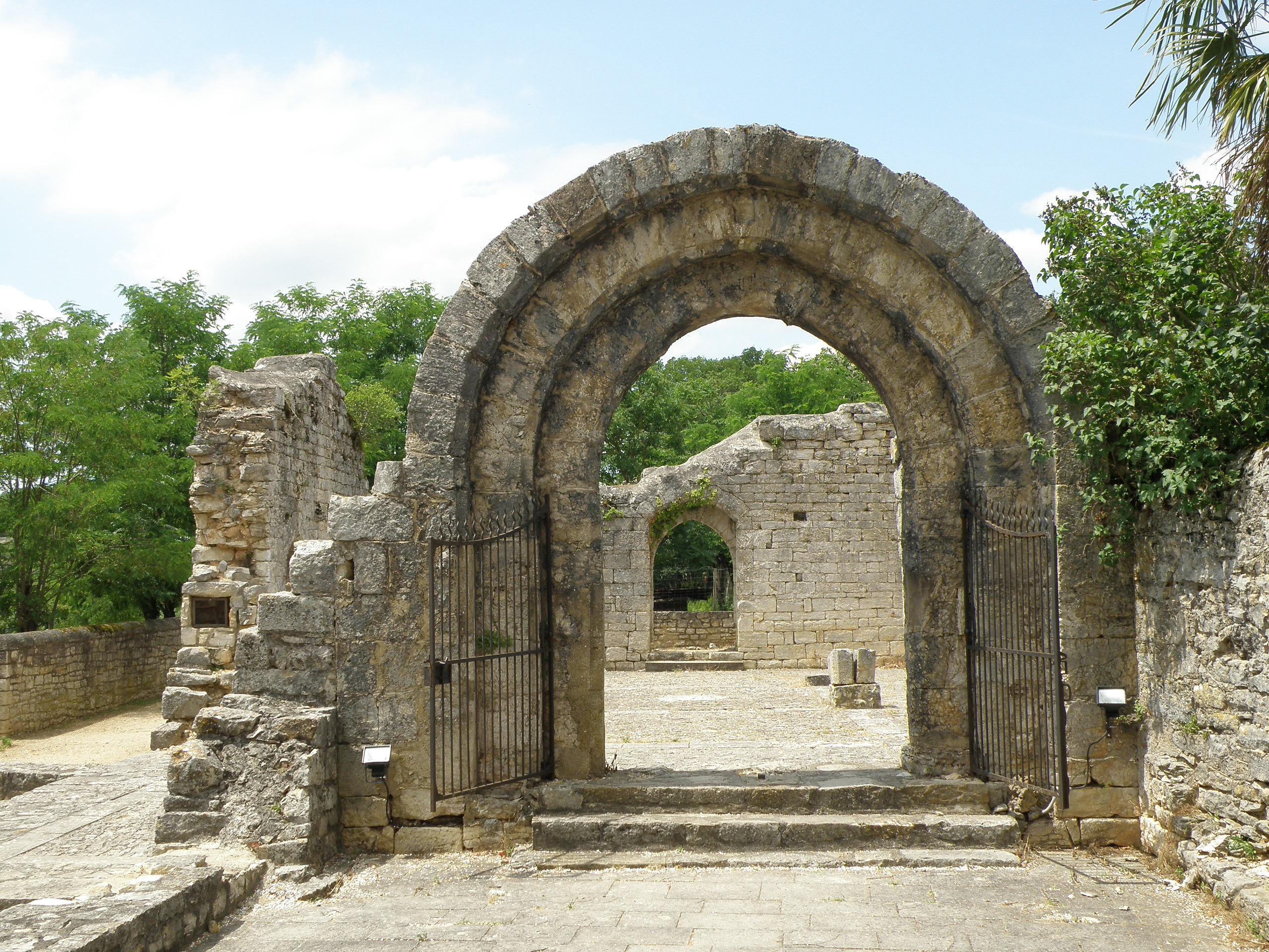 Rocamadour (Lot). Hameau de l'Hospitalet. Ruines de l'ancien hôpital : portail d'entrée à triple voussure.